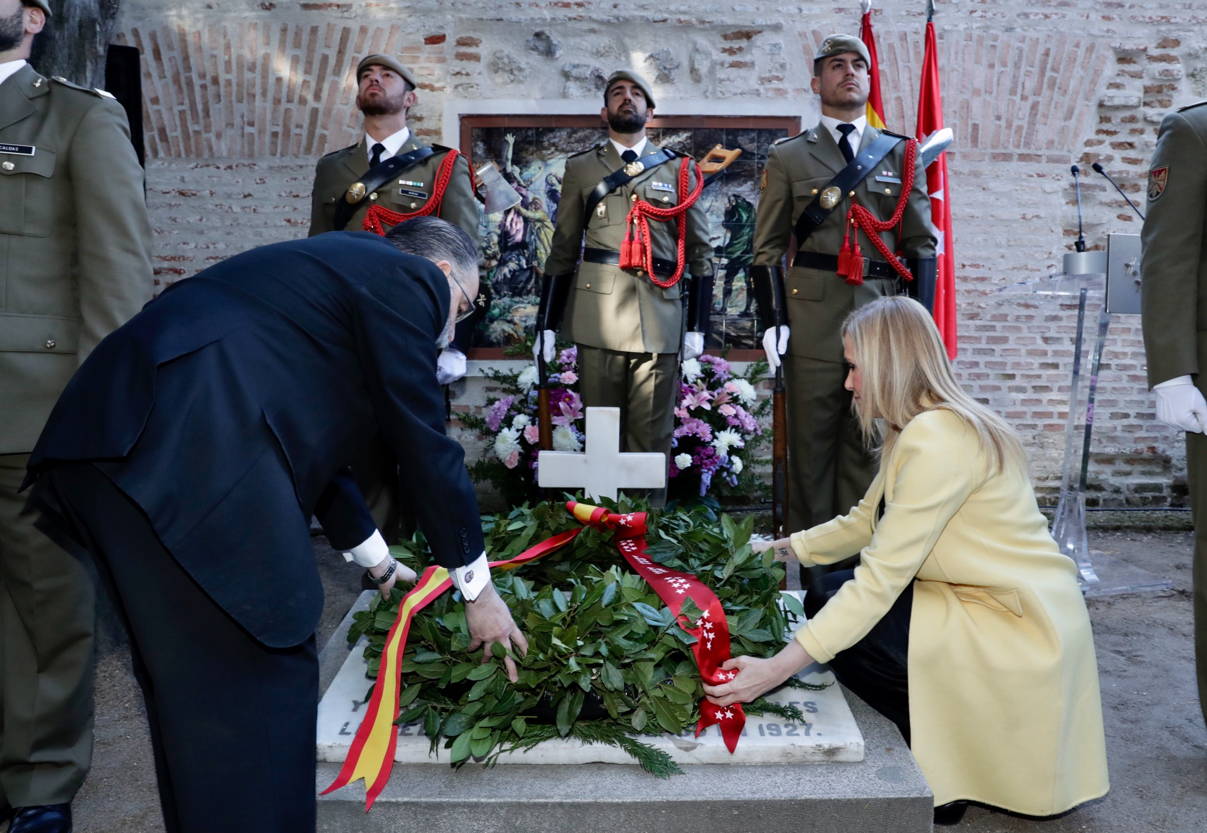 Tradicional ofrenda floral a los Héroes del 2 de mayo de 1808 en el Cementerio de la Florida por parte de Cristina Cifuentes, junto al presidente de la Sociedad Filantrópica de Milicianos Nacionales Veteranos, José Luis Sampedro. Esta entidad custodia, desde hace un siglo, este histórico recinto madrileño.